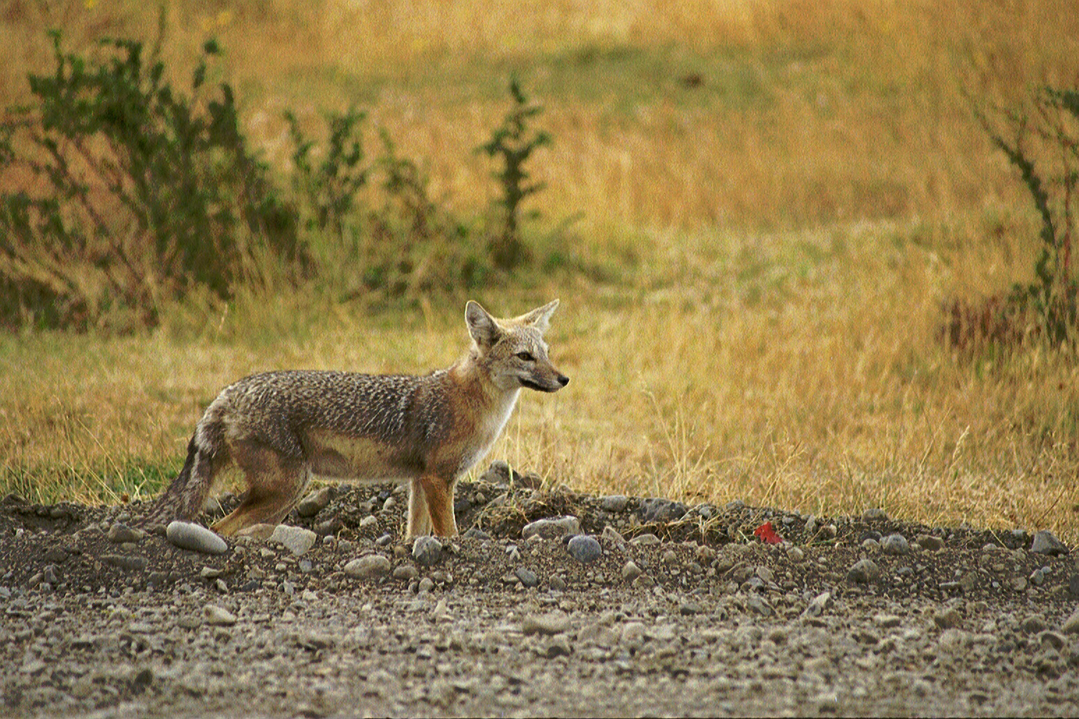 Patagonischer Fuchs